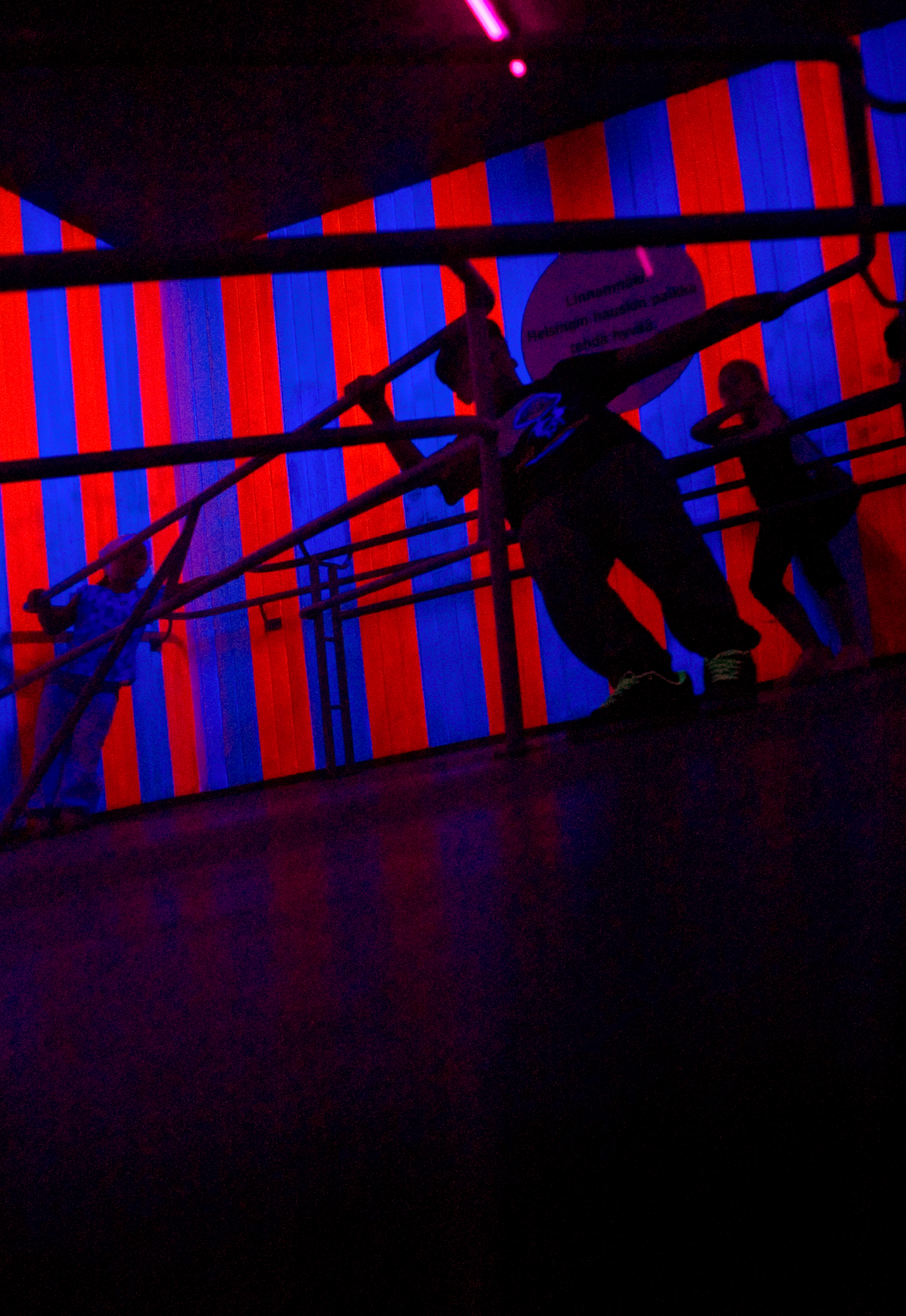 Linnanmäen Vekkula